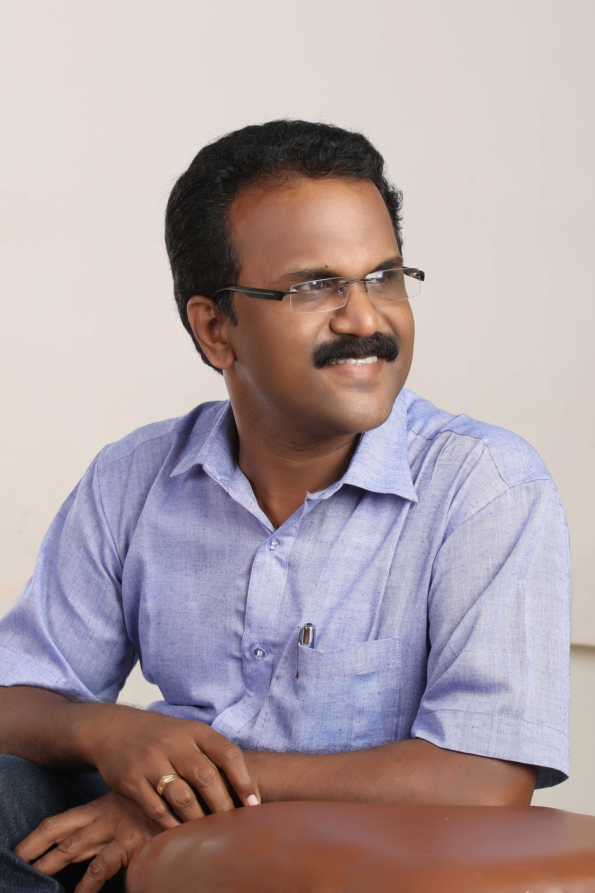 ഒ.എസ്. ഉണ്ണികൃഷ്ണൻ